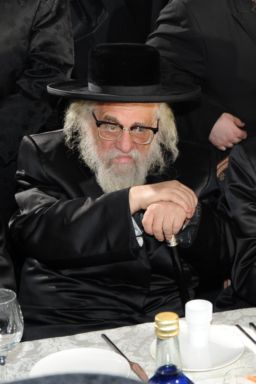 תמונתו של הרב יחזקאל ראטה